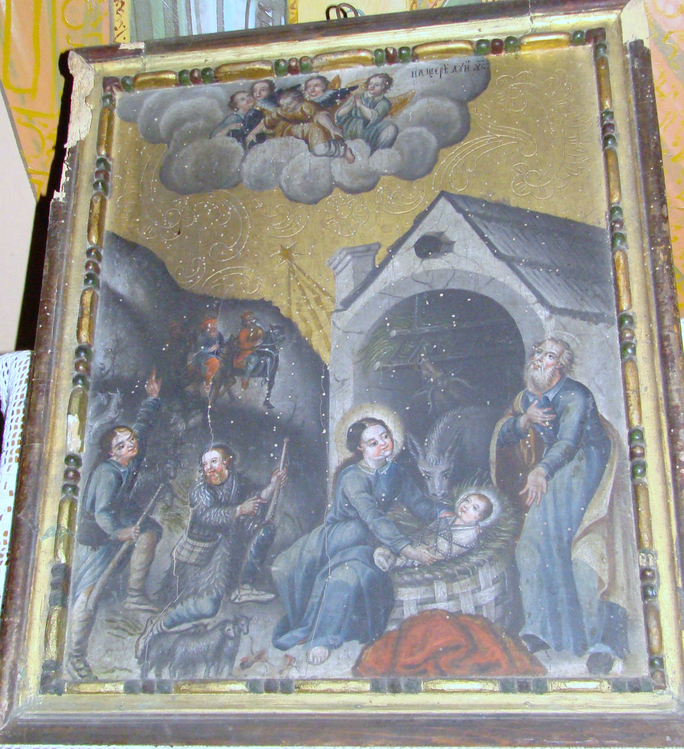 Biserica "Cuvioasa Paraschiva", sat Cetățele; comuna Șișești 01